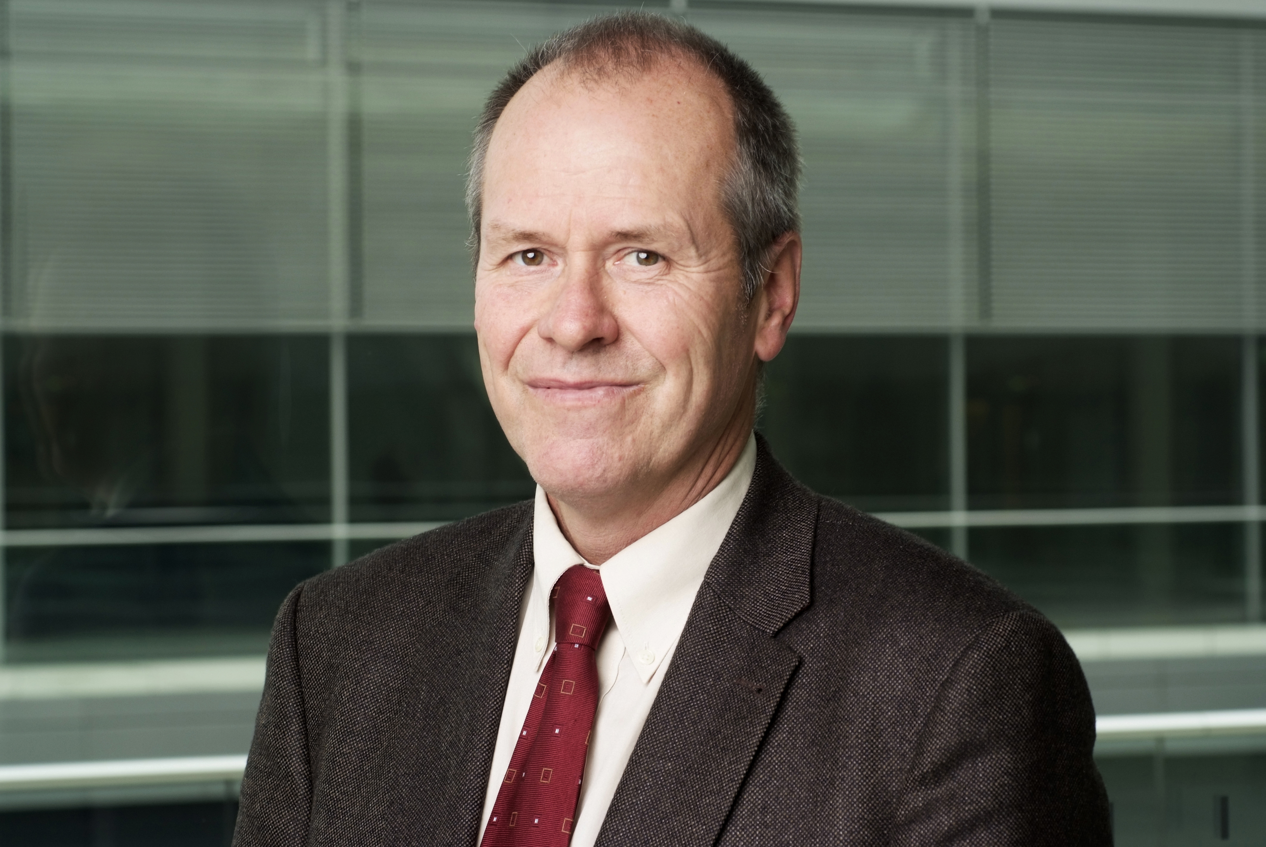 Friedrich Ostendorff MdB, Bündnis 90/Die Grünen Bundestagsfraktion